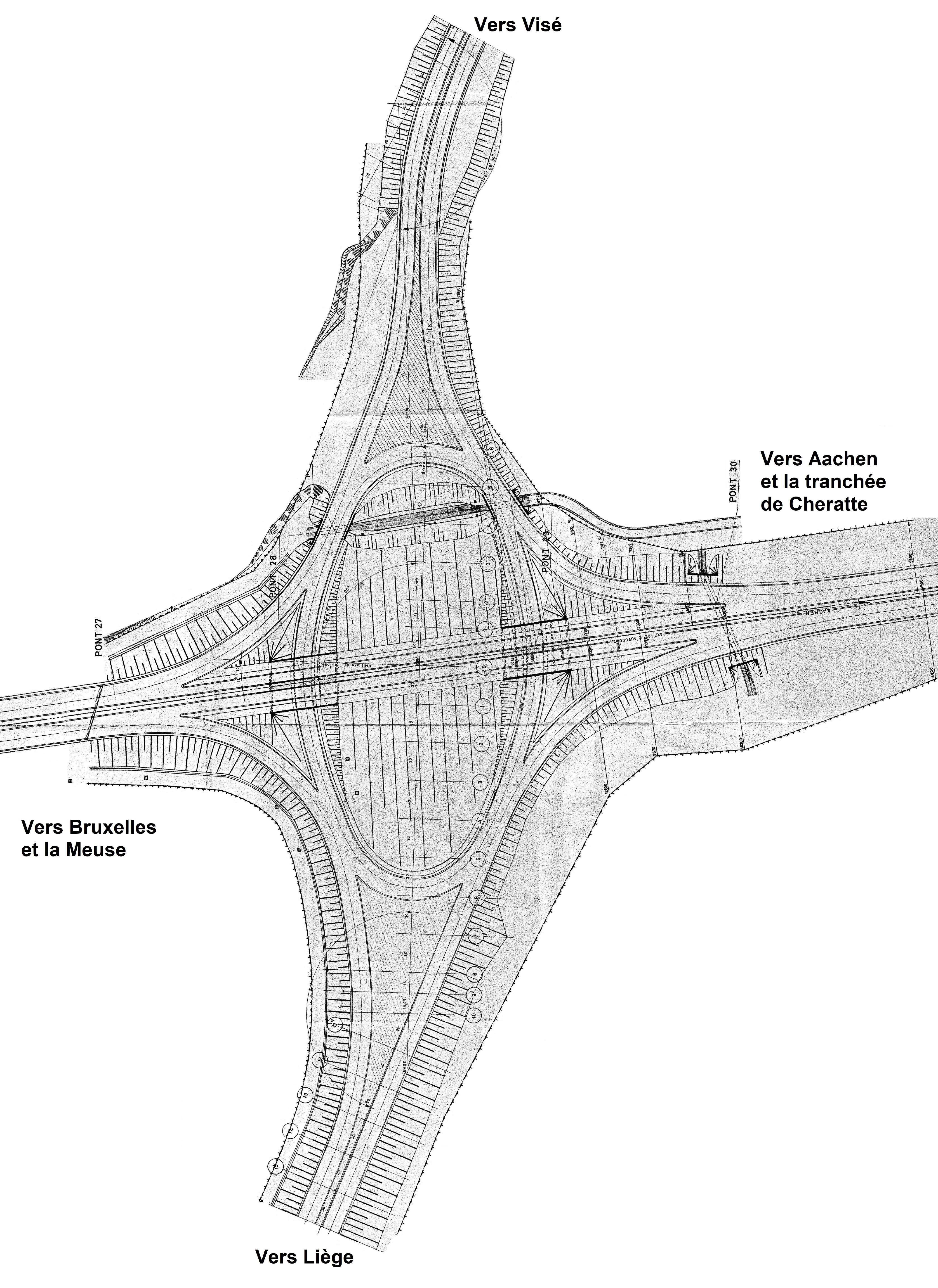 Plan de l'échangeur de Cheratte au croisement des autoroutes E25xE40 lors de sa mise en service, en 1965.